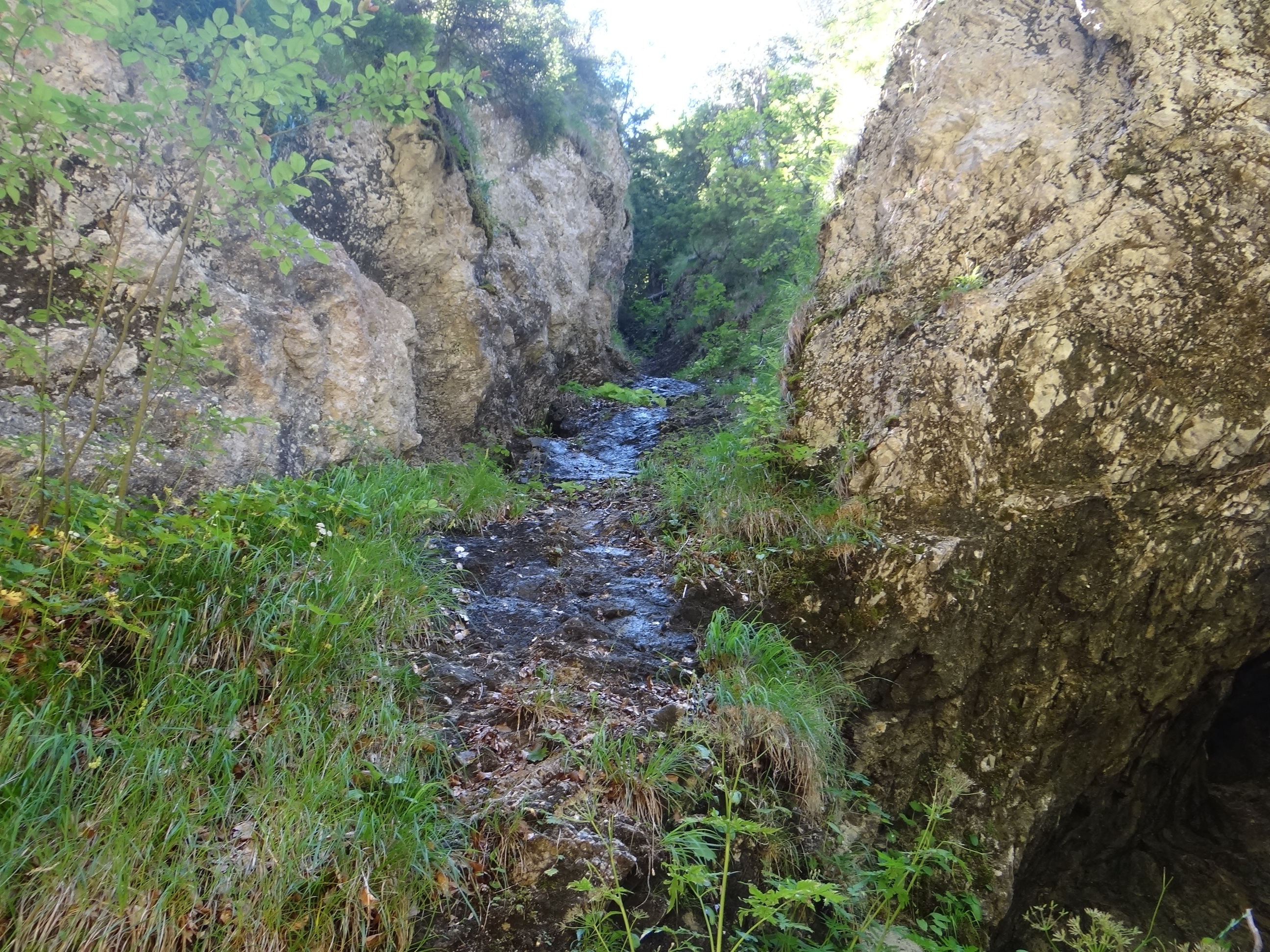 Dierový potok